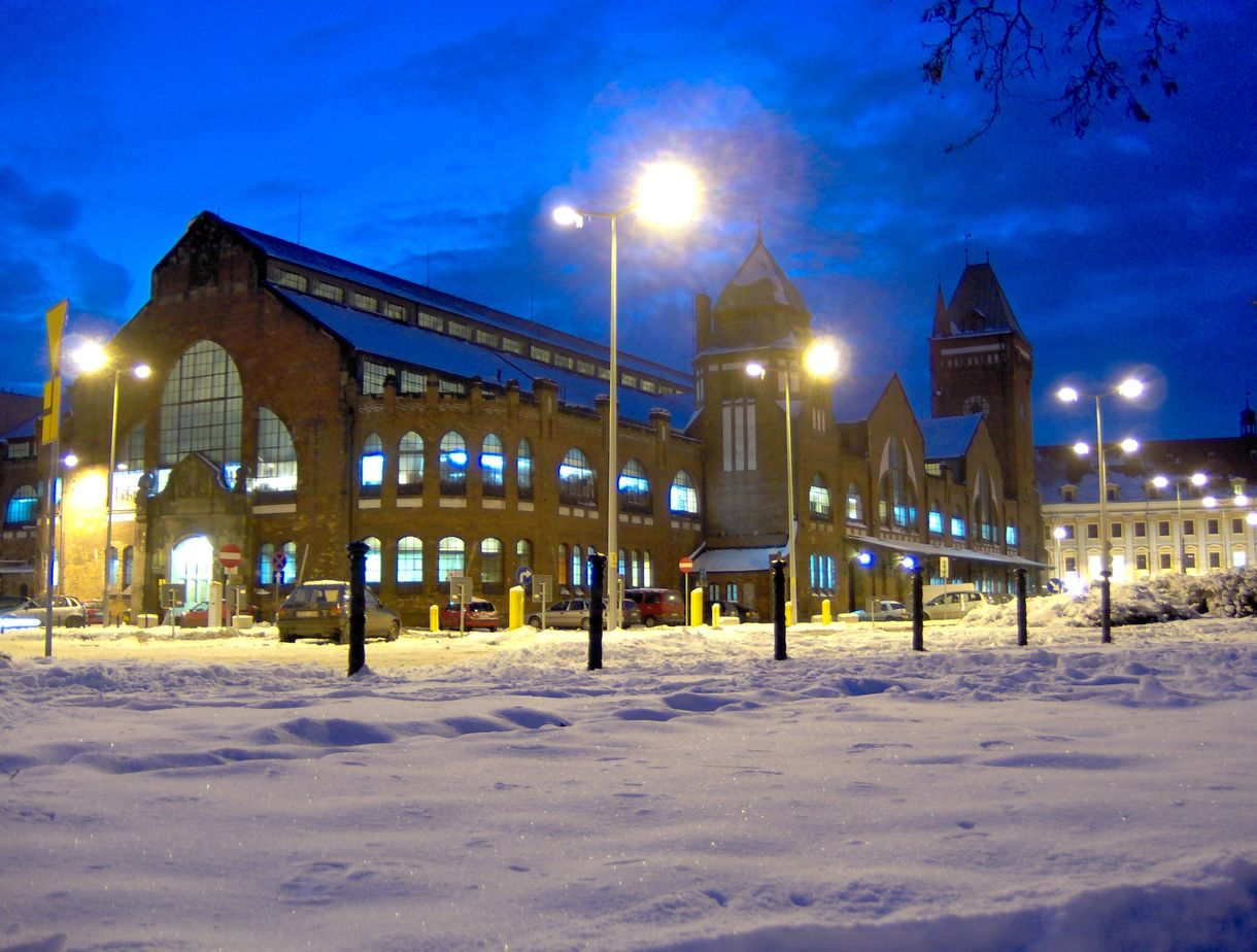 Hala Targowa - nucek